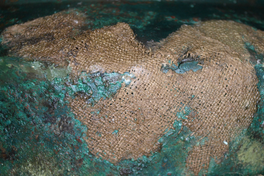 Bronzeeimer von Sasendorf, Stoffanhaftungen